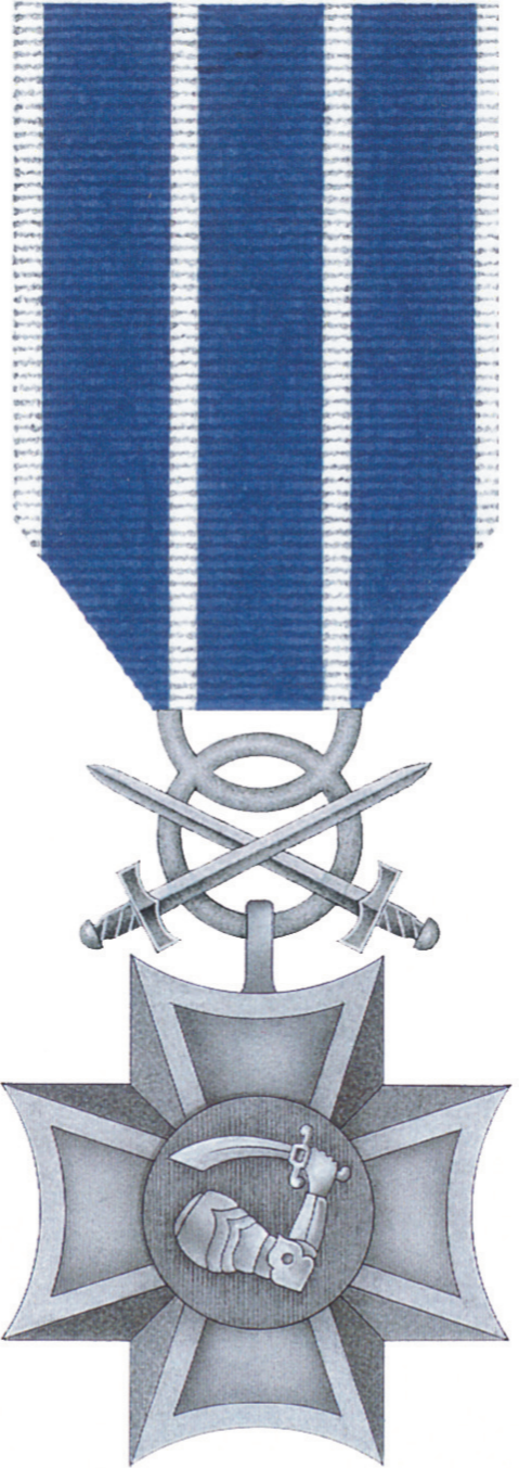 Morski Krzyż Zasługi z Mieczami. Awers.